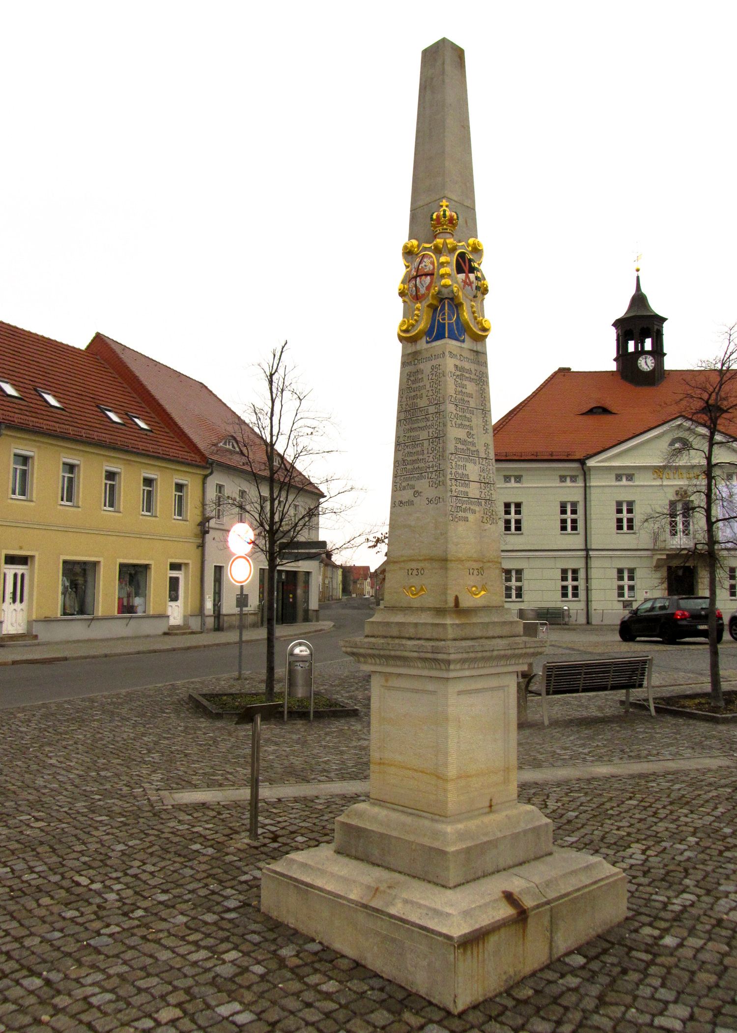 Kursächsische Postmeilensäule-Distanzsäule auf dem Marktplatz in Ortrand